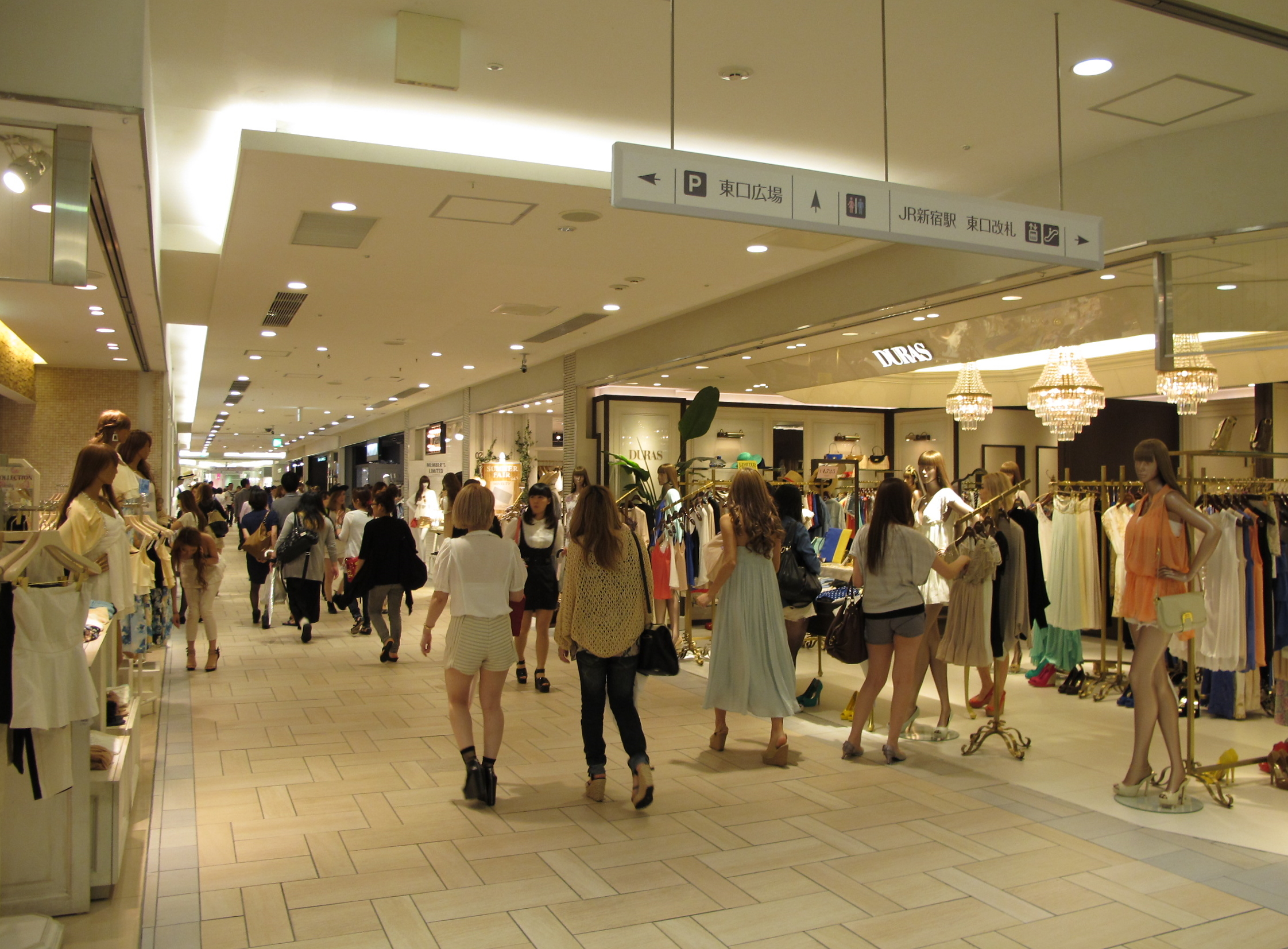 LUMINE EST Basement access